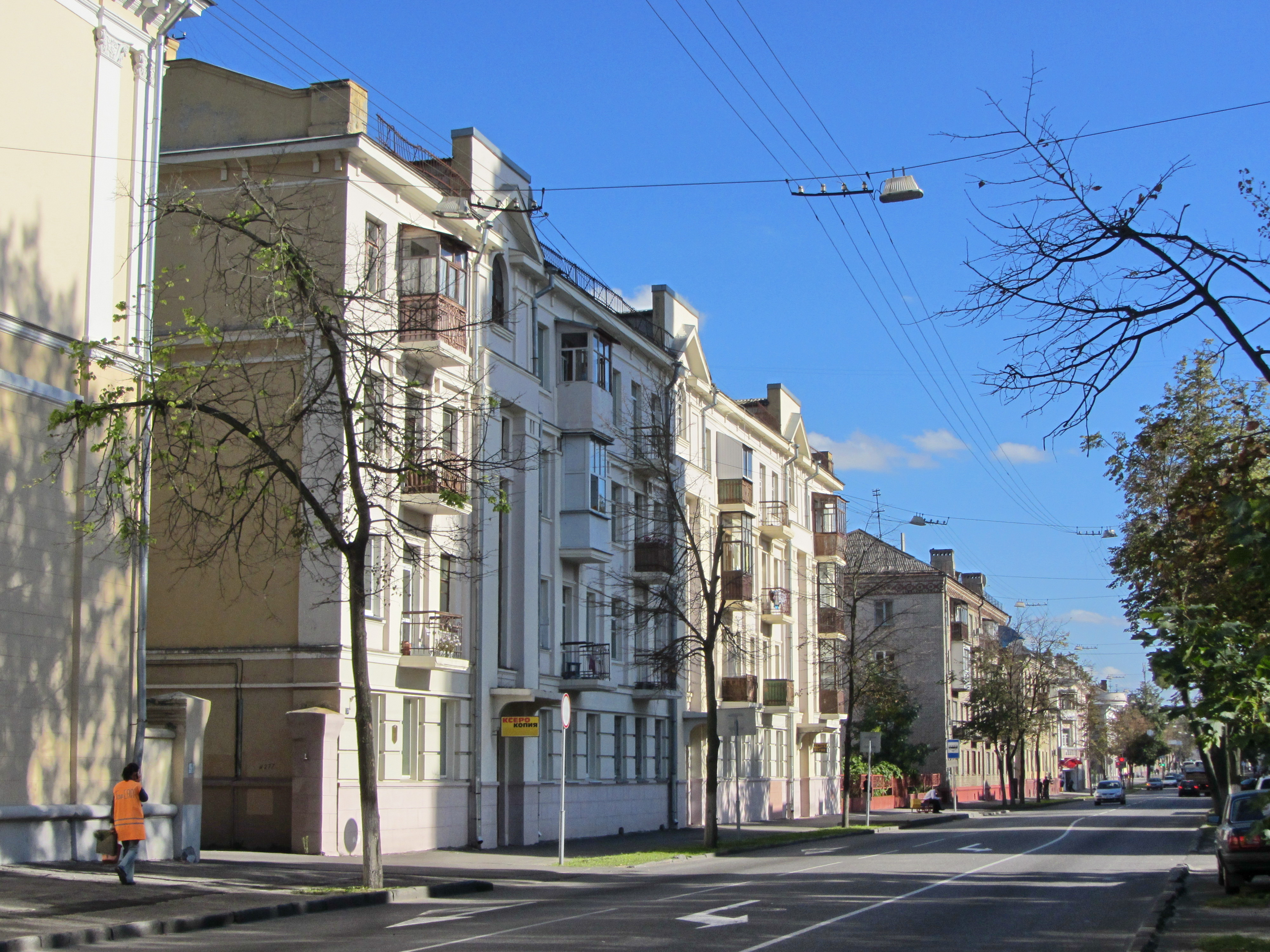 Беларуская (тарашкевіца): Забудова вул. Кірава. г. Гомель This is a photo of Belarusian heritage monument. Reference number: 313Г000034 ( WLM)